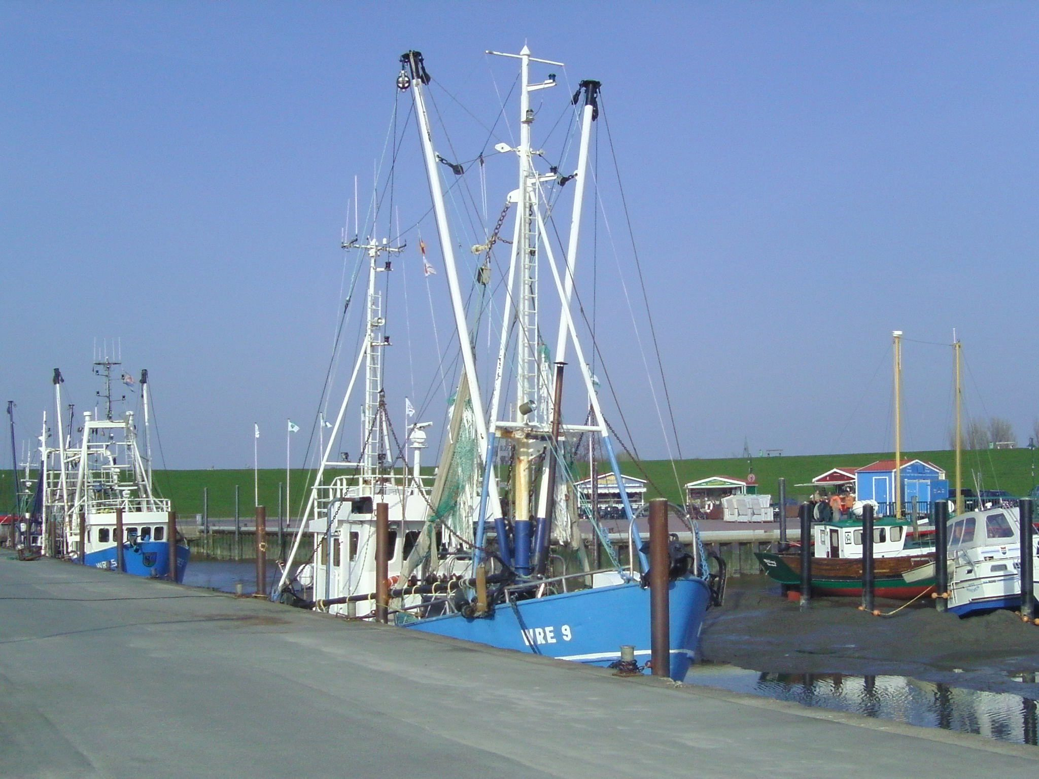 Kutter im Hafen von Wremen (Landkreis Cuxhaven)